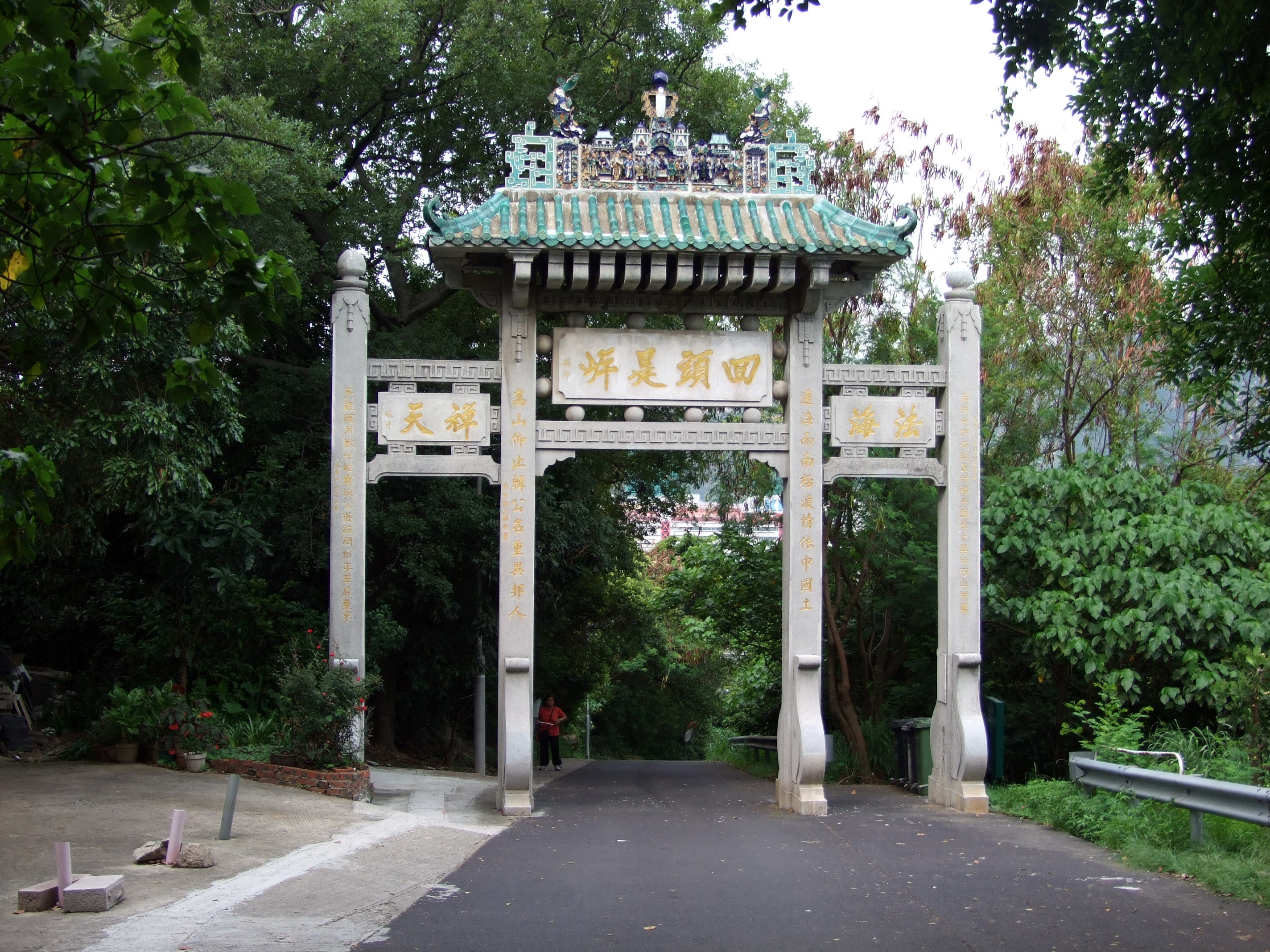 中文（香港）: 香海名山牌樓背面